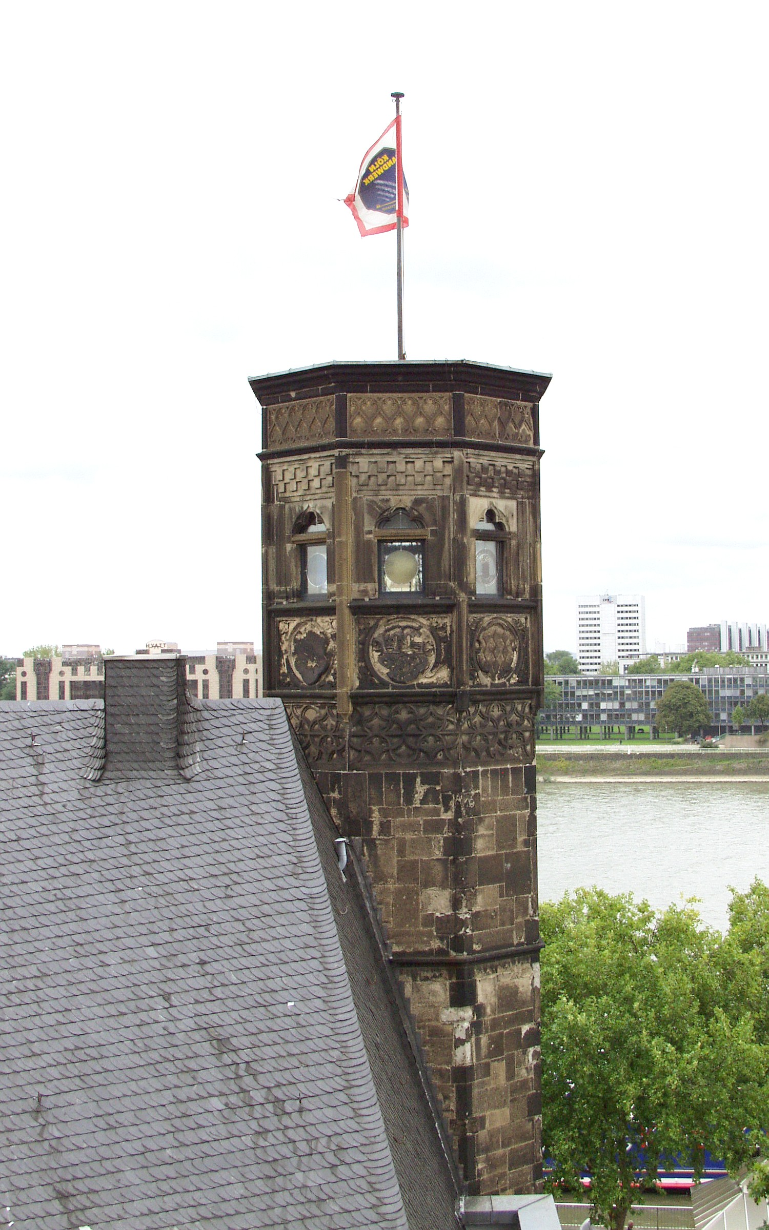 Treppenturm des Stapelhauses in Köln